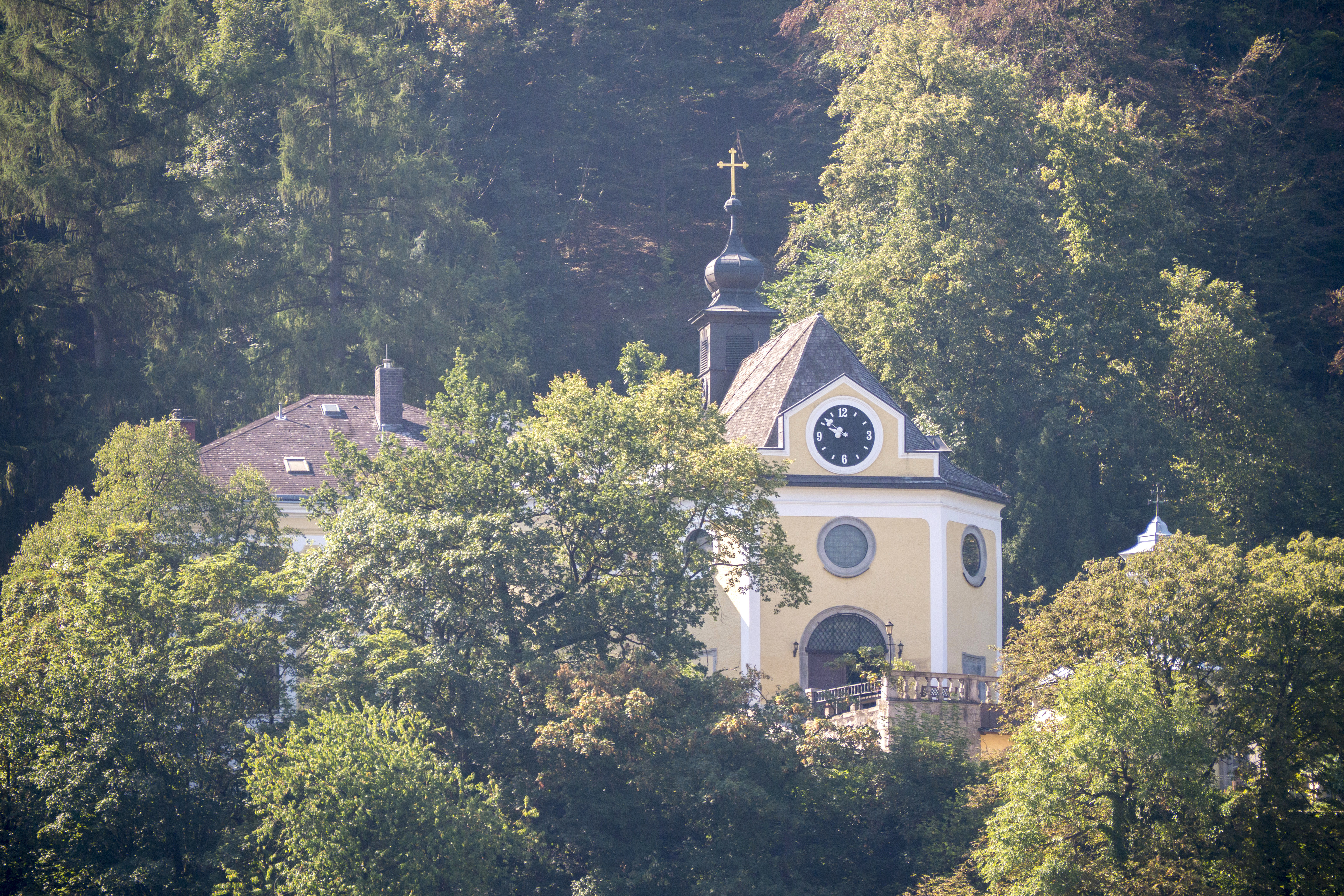 Kalvarienbergkirche St. Margarethen, Auffindung des hl. Kreuzes